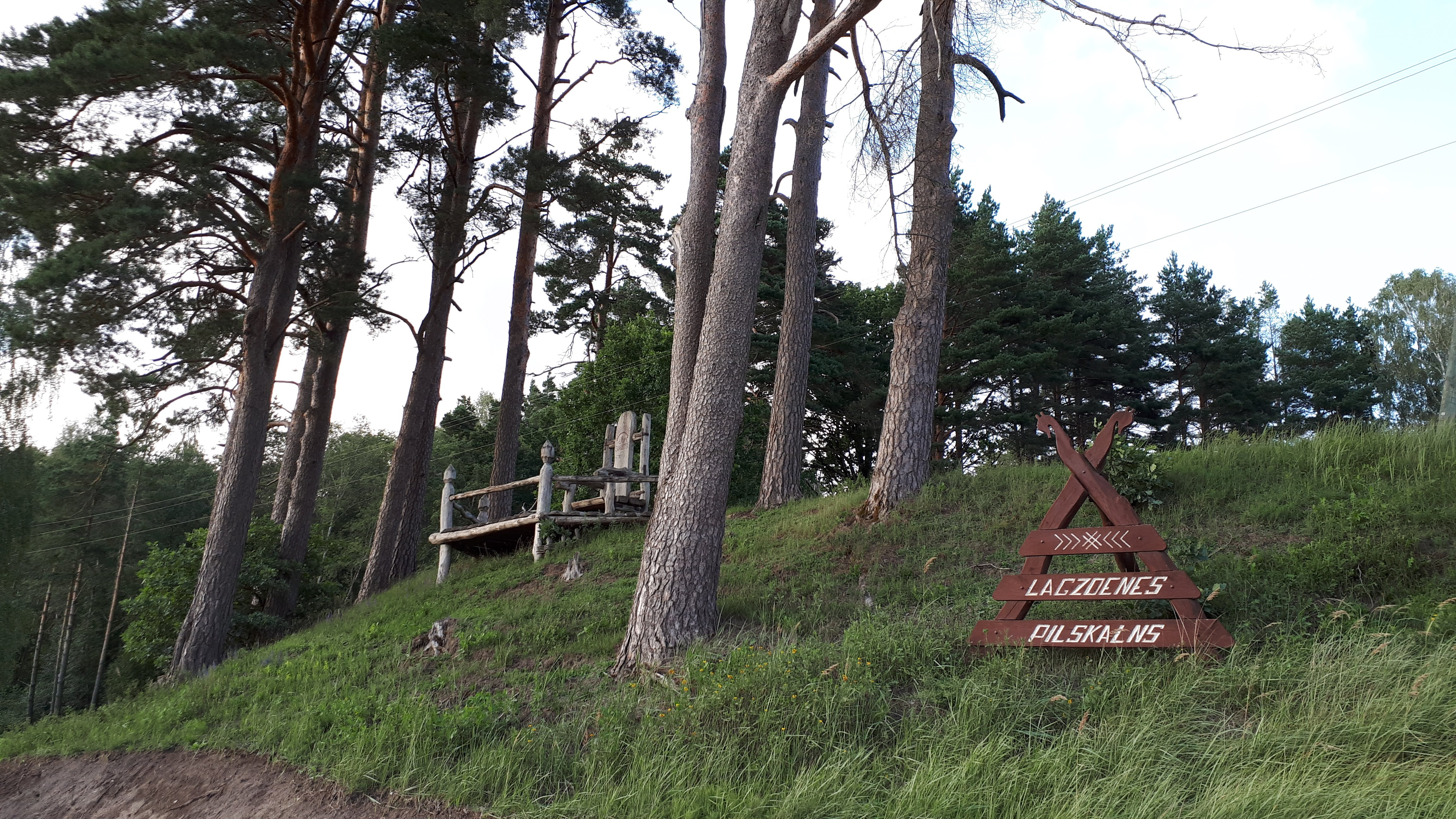 Lagzdīnes pilskalns, Piltenes pagasts